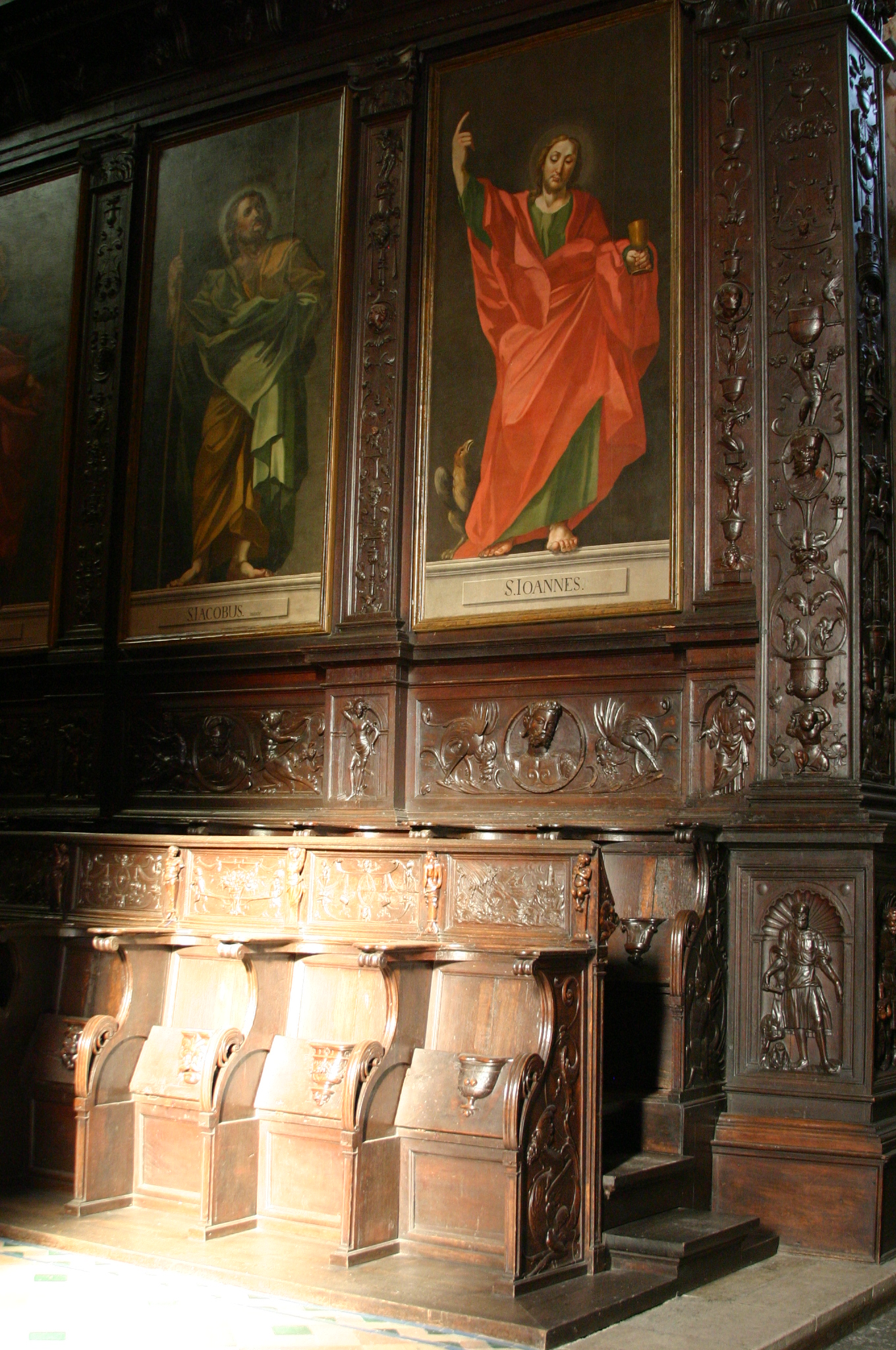 Cadeiras no coro